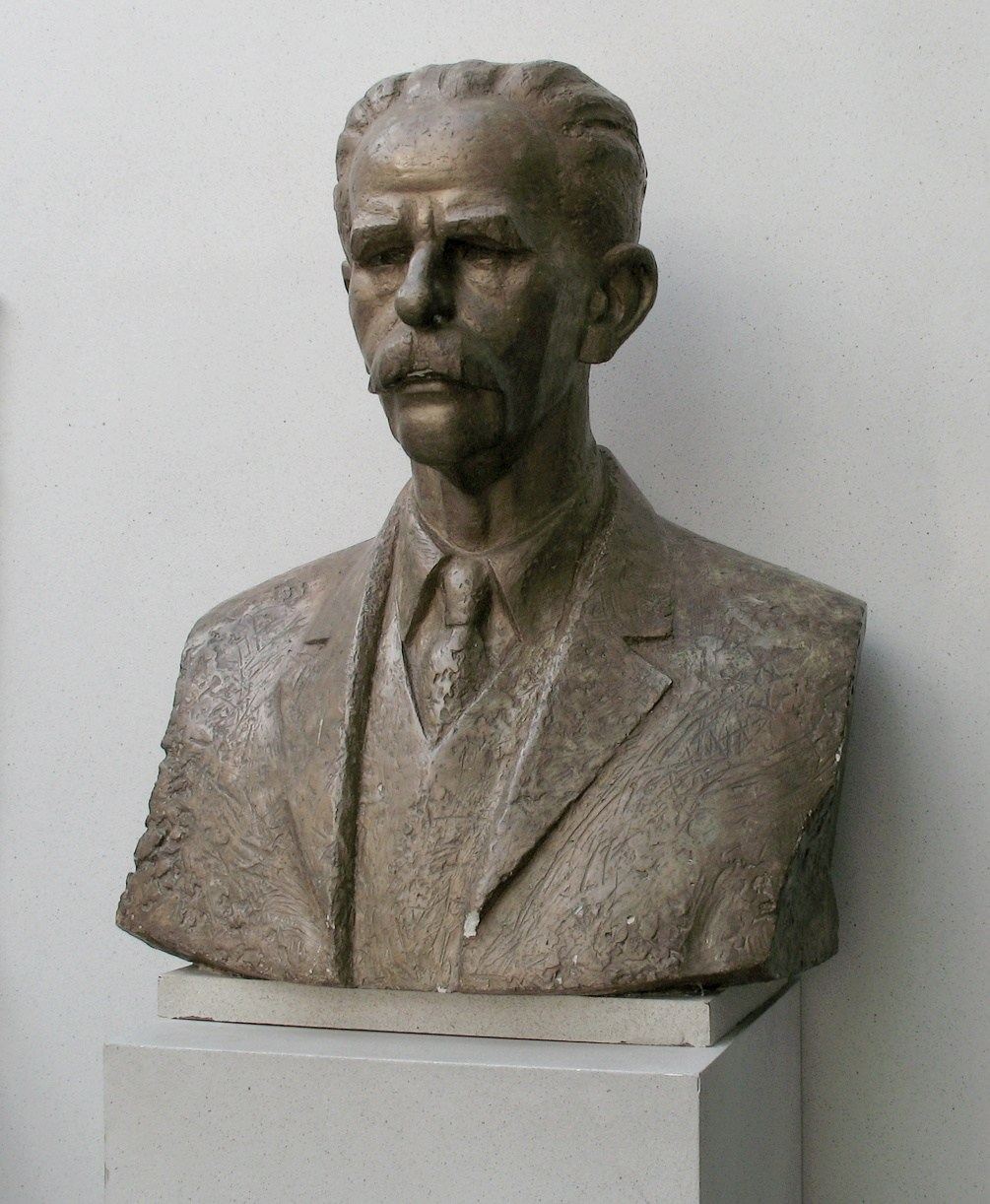 Popiersie Kotarbińskiego. Hall Uniwersytetu Zielonogórskiego autor: Mohylek 15:14, 20 March 2007 (UTC)